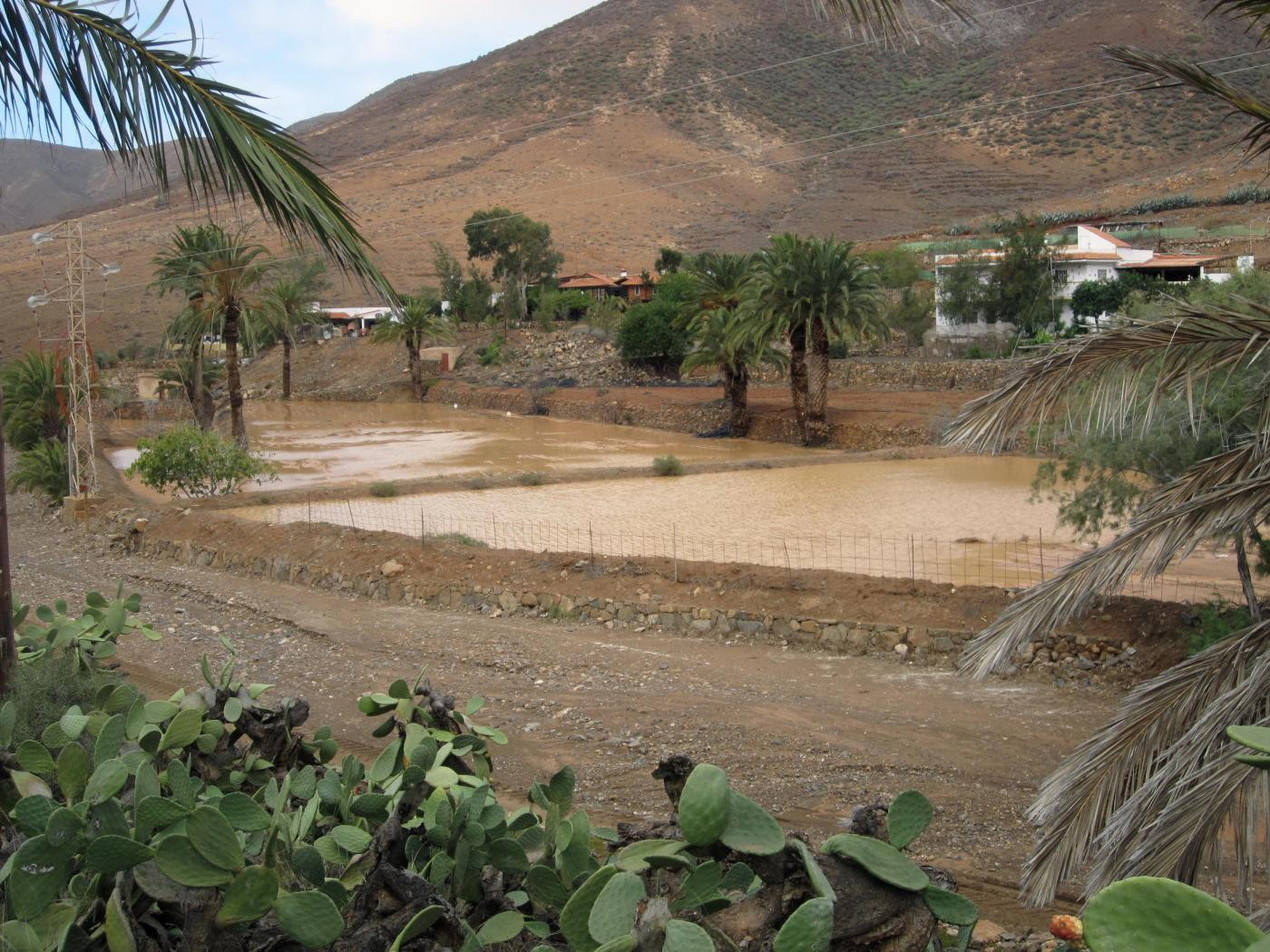 Fuerteventura, Vega de Rio Palmas, Feldbewässerung, Foto 2014